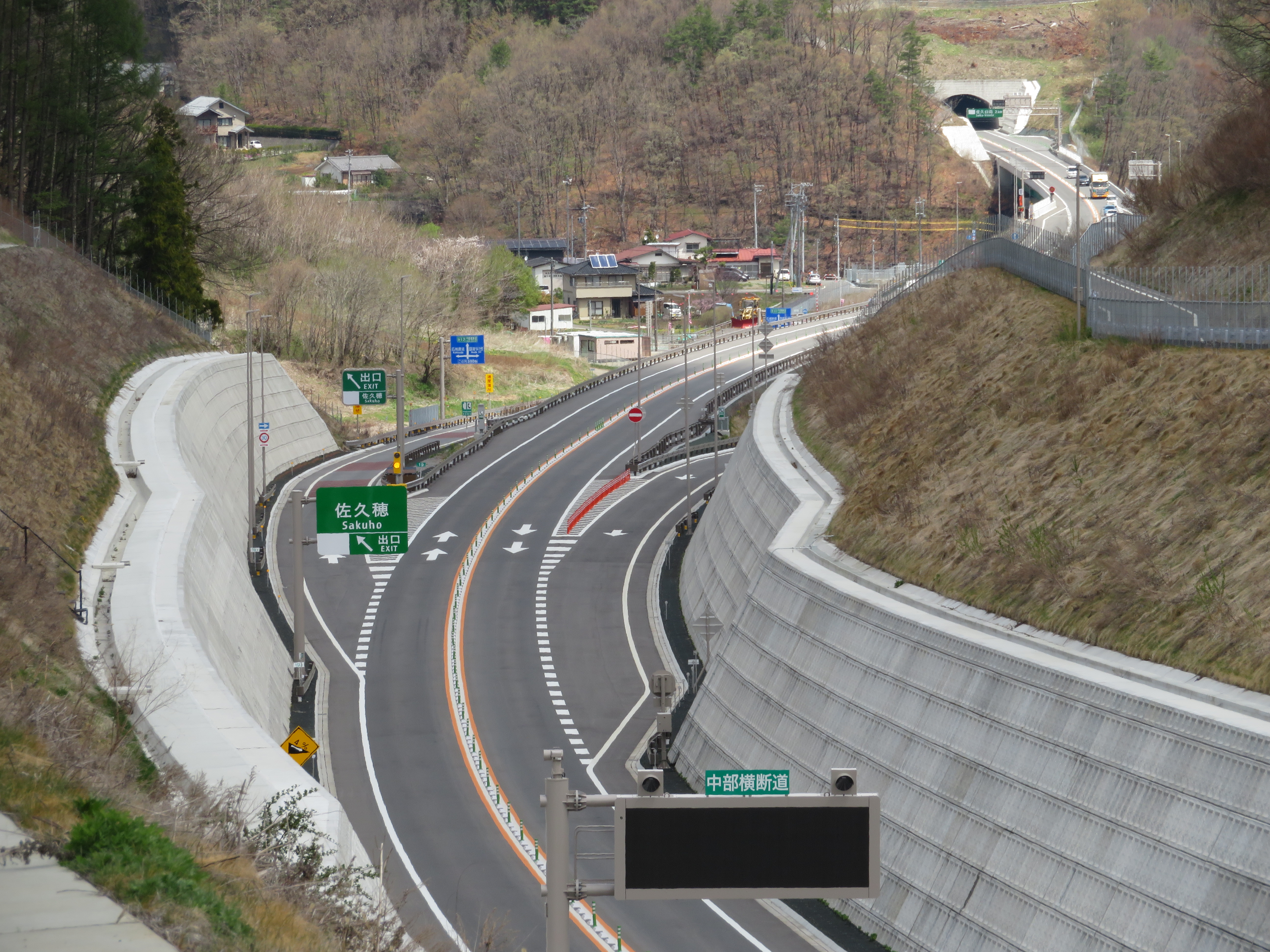 中部横断自動車道佐久穂インターチェンジ出入口付近（佐久小諸ＪＣＴ方面を撮影） Canon PowerShot SX720 HS